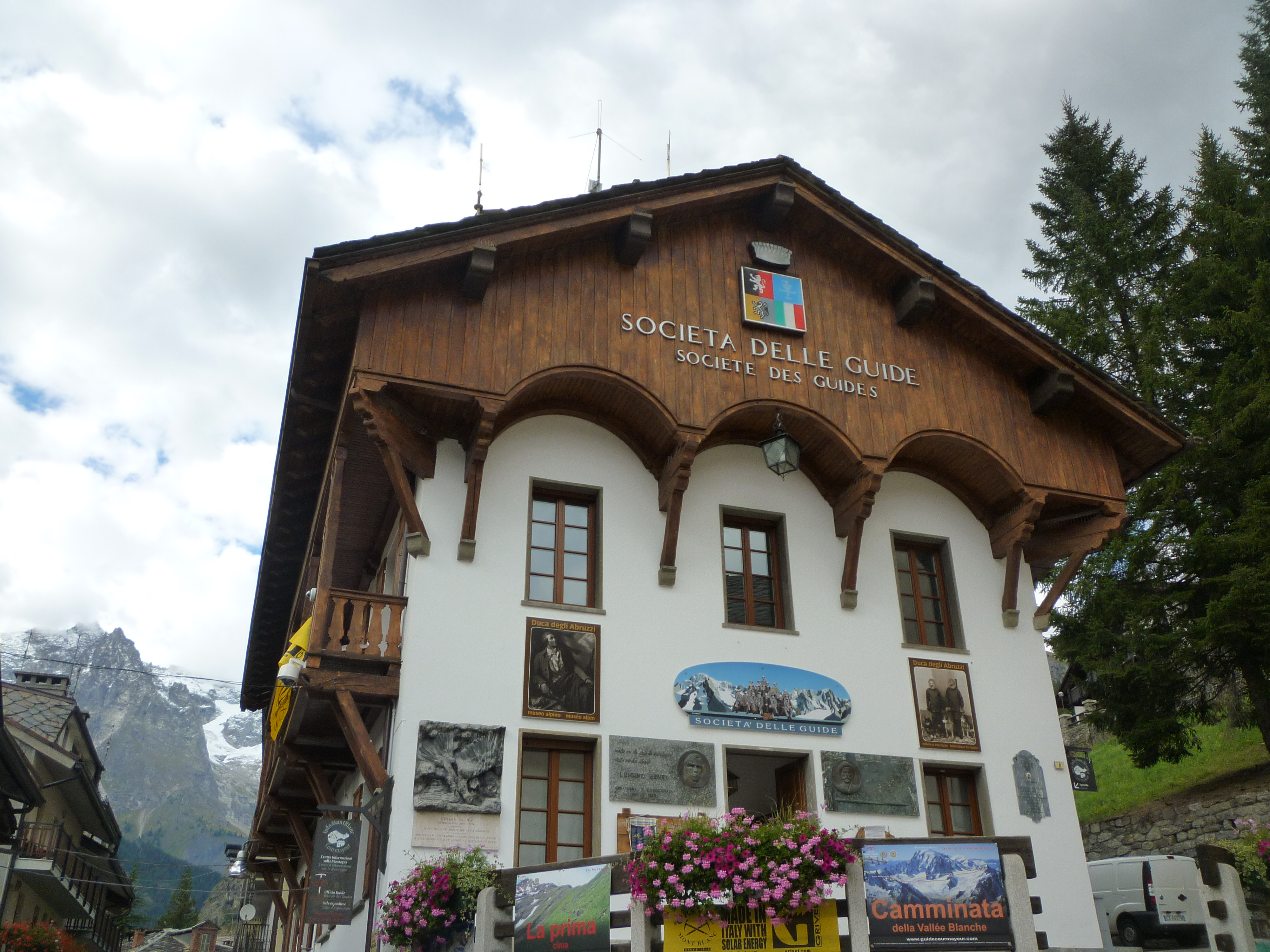 Bâtiment siège de la Société des guides de Courmayeur